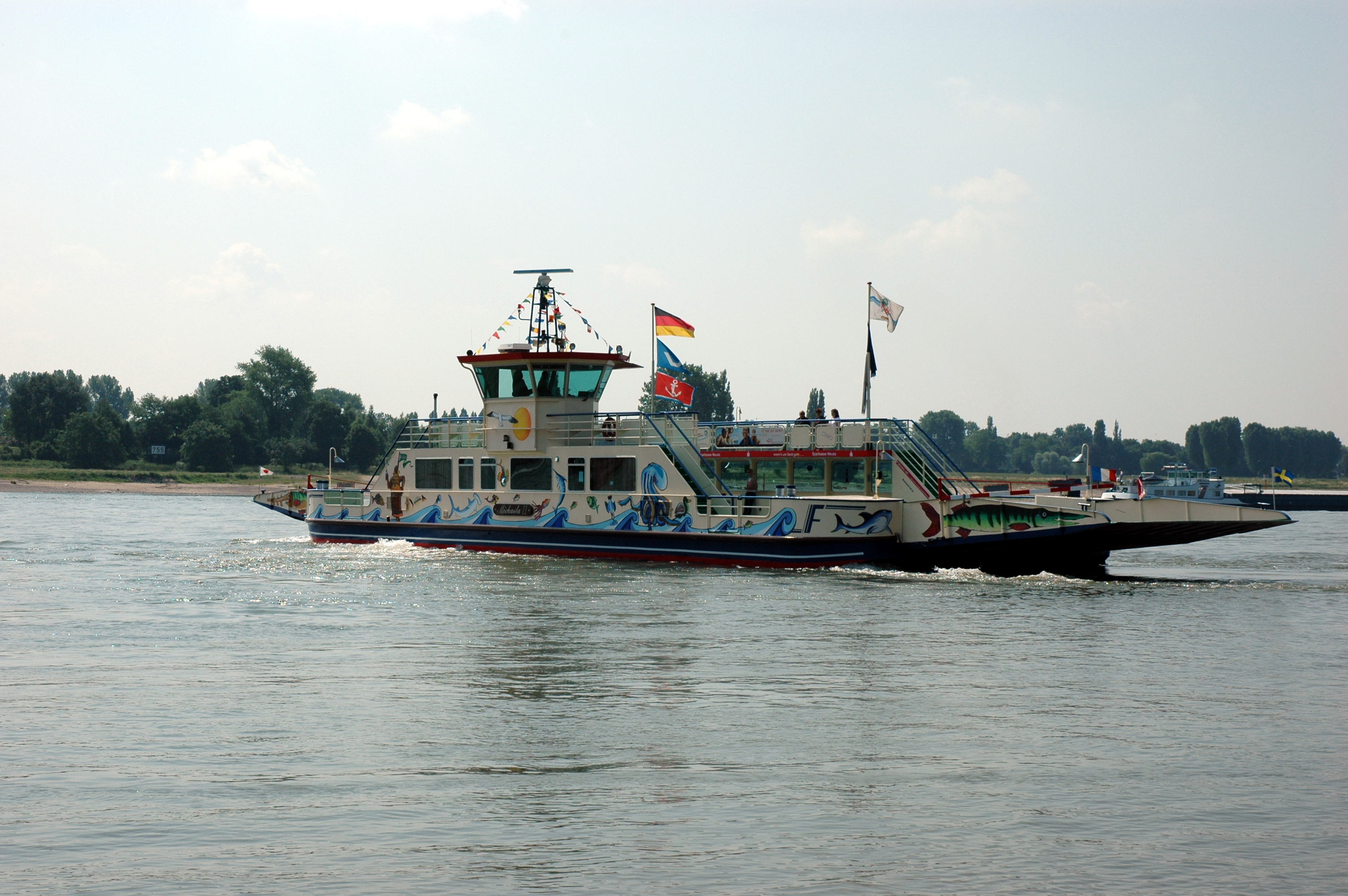 Rheinfaehre Meerbusch-Langst Duesseldorf-Kaiserswerth